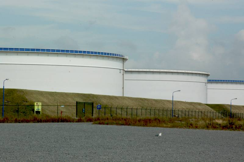 foto opslagtanks Maasvlakte, eigen foto Caseman